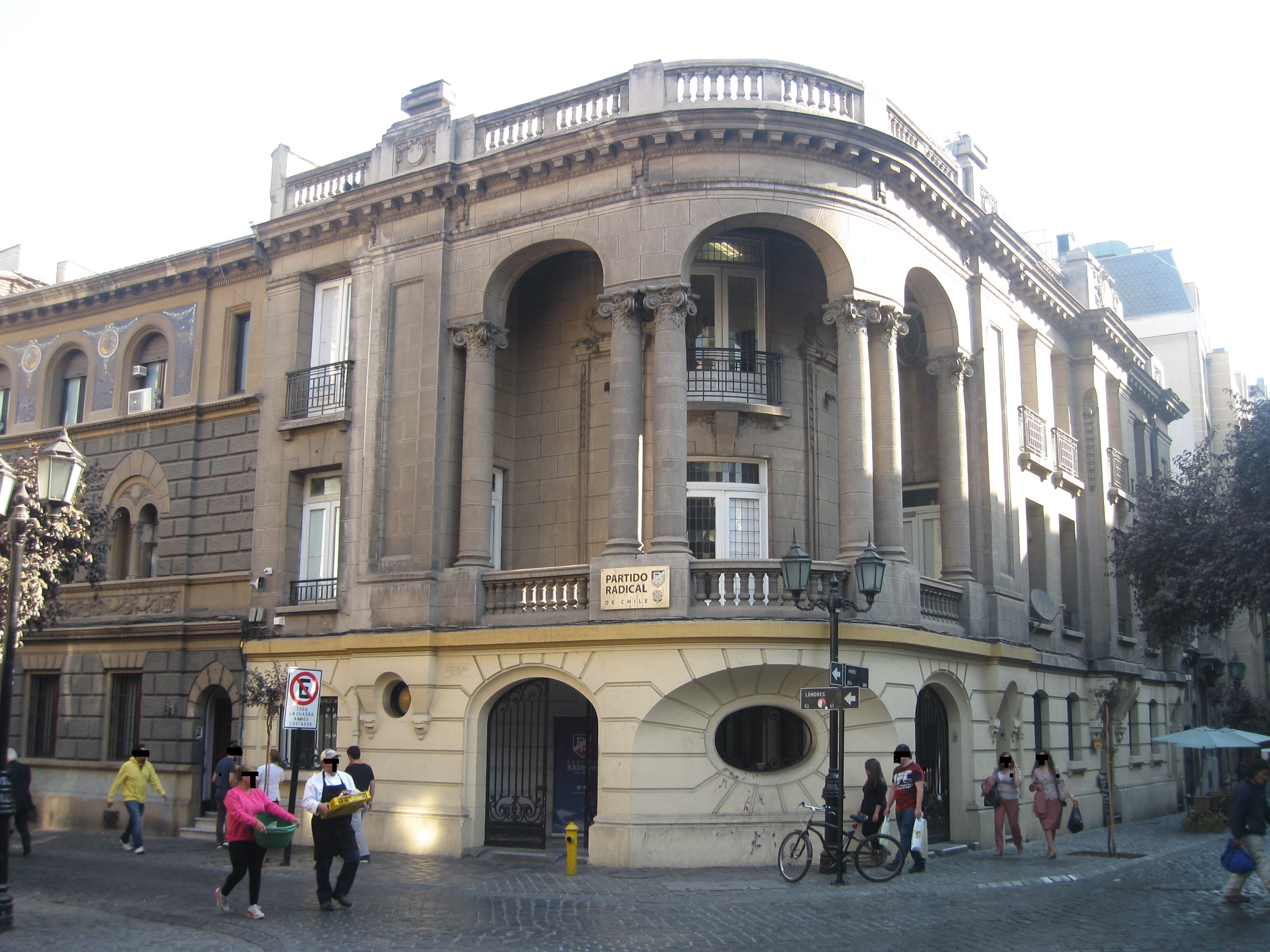 Parteizentrale der Radikalen Partei im Barrio París-Londres von Santiago de Chile